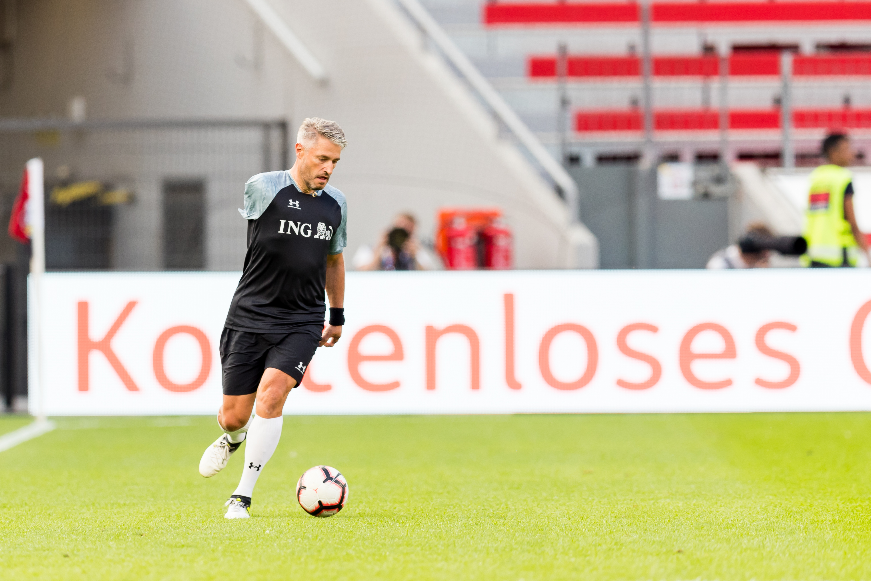 Gerd Schönfelder during Champions for Charity at BayArena, Leverkusen, Nordrhein-Westfalen, Germany on 2019-07-21, Photo: Sven Mandel